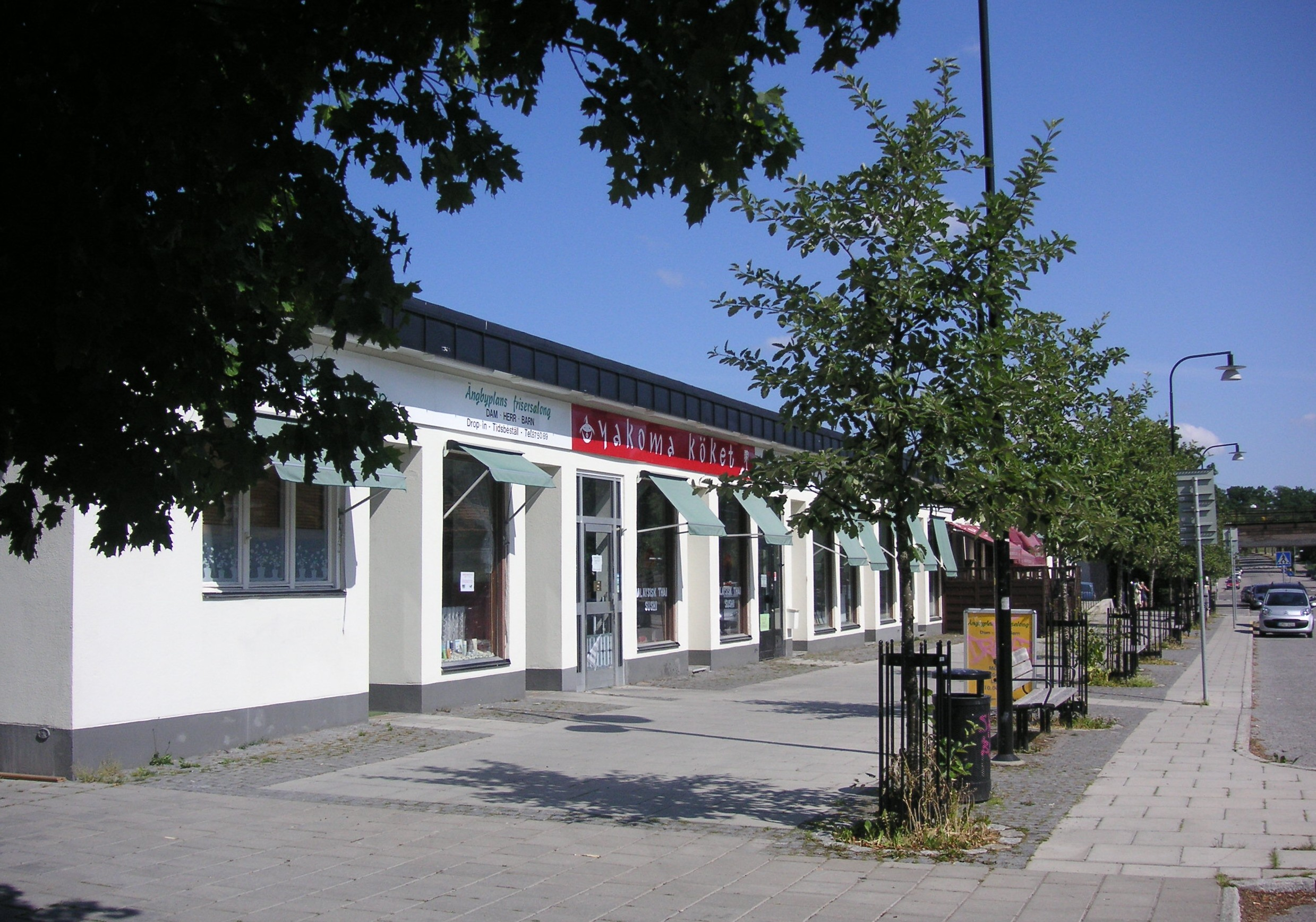 Ängbyplan i Bromma/Stockholm